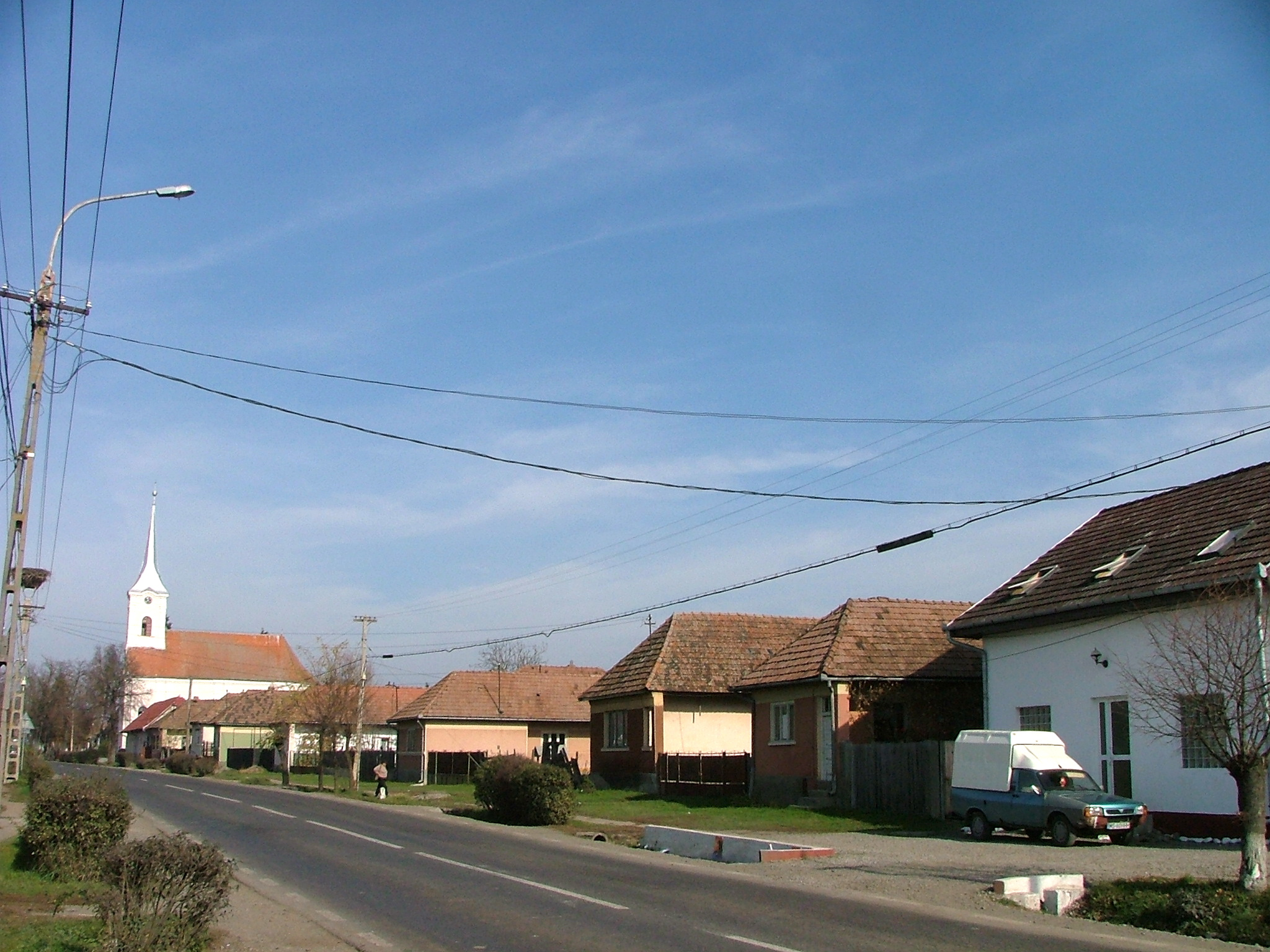 Sáromberke főutcája, hátérben a református templom